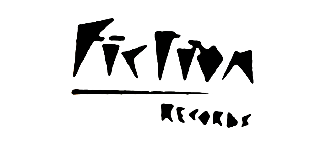 Logotipo antiguo de la discográfica Fiction Records